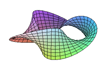 Variante d'une bande de Möbius Licensing Source : image créée par l'auteur (Theon)